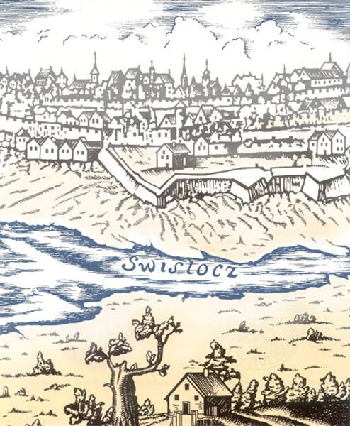 Беларуская (тарашкевіца): Менск (Miensk). Гравюра